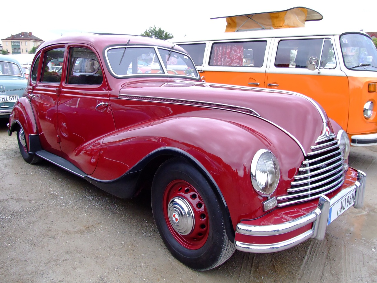 Quelle: selbst fotografiert, 07/2007 Fotograf: Späth Chr.